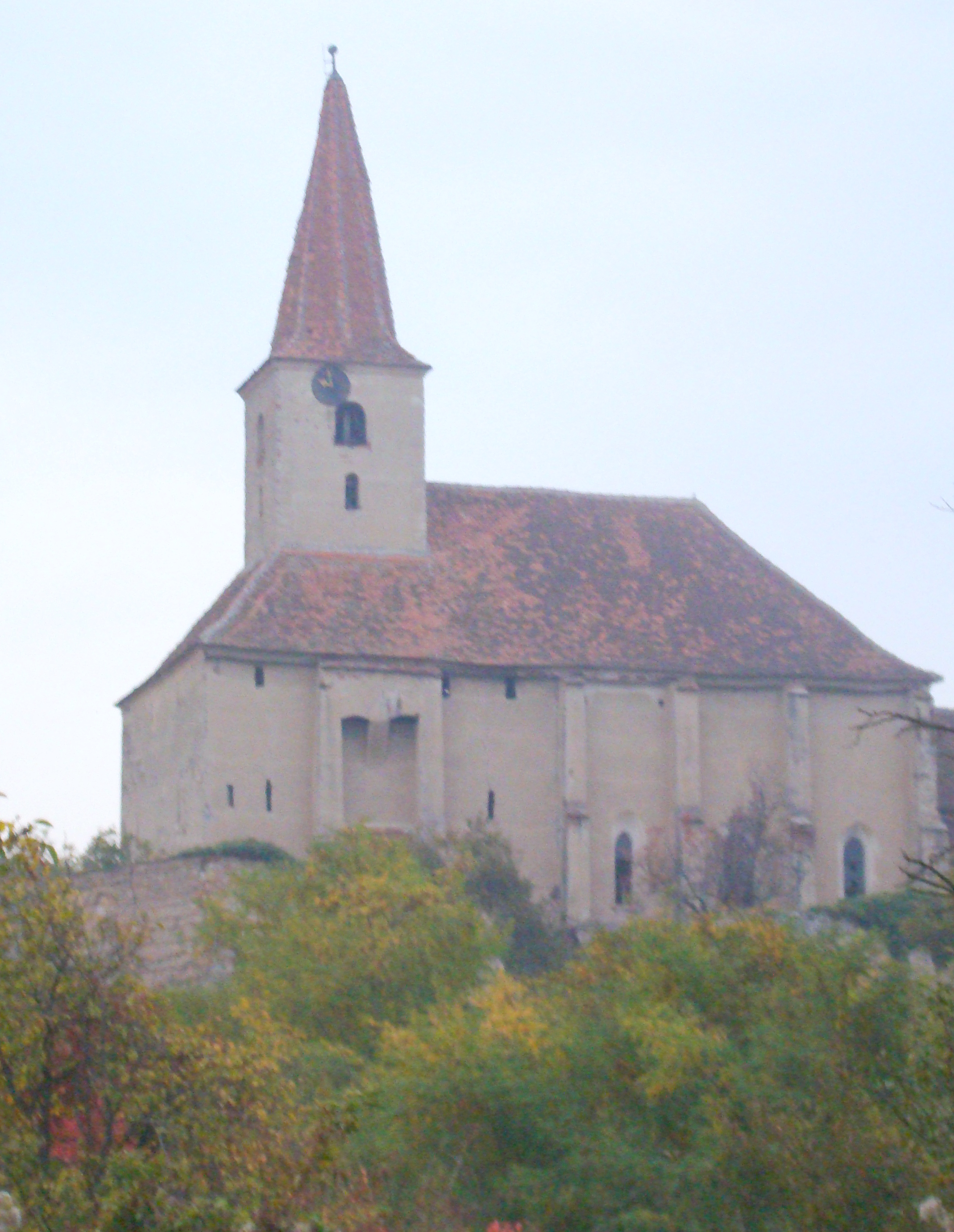 Ansamblul bisericii evanghelice fortificate, sat Dobârca; oraș Miercurea Sibiului